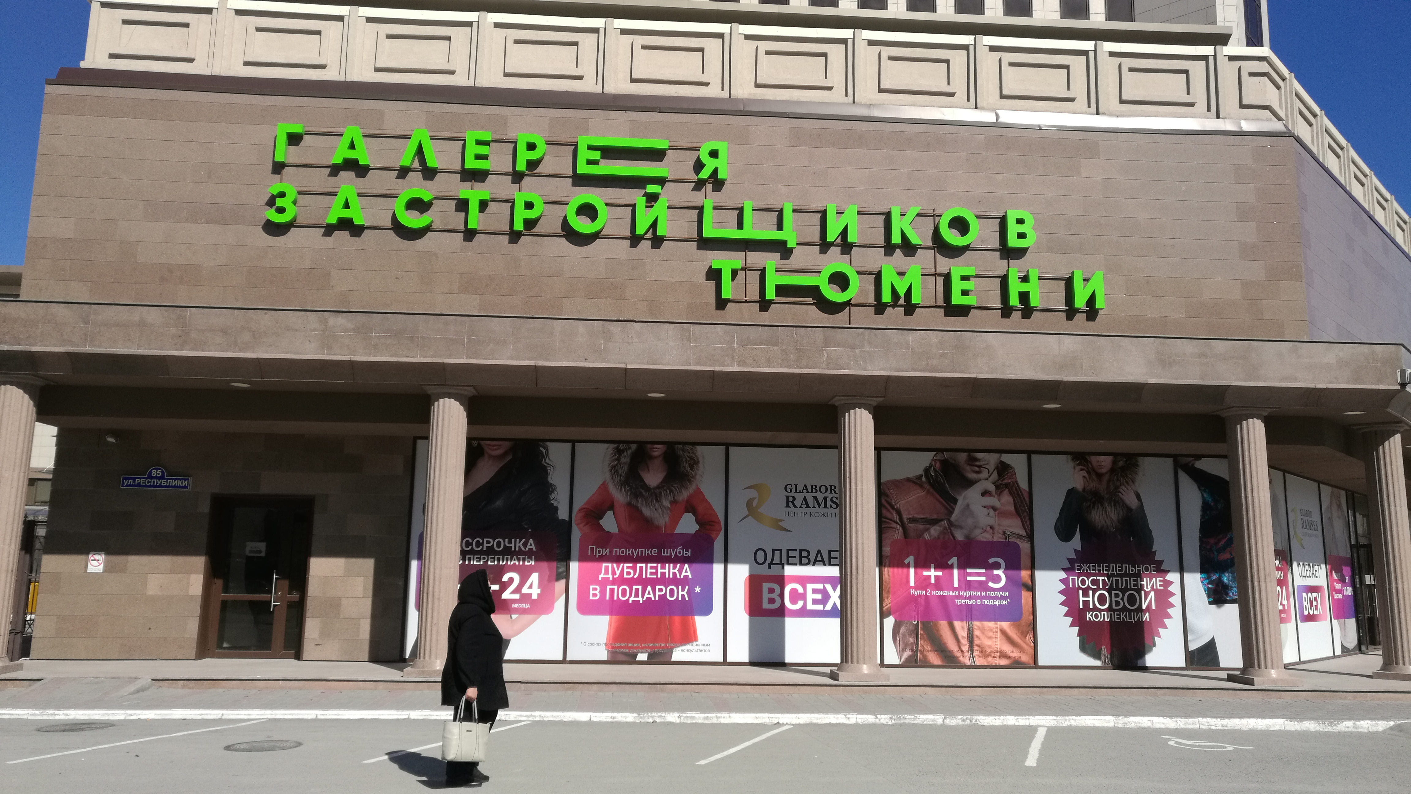 Strato Respubliko. Tjumeno, Rusio.